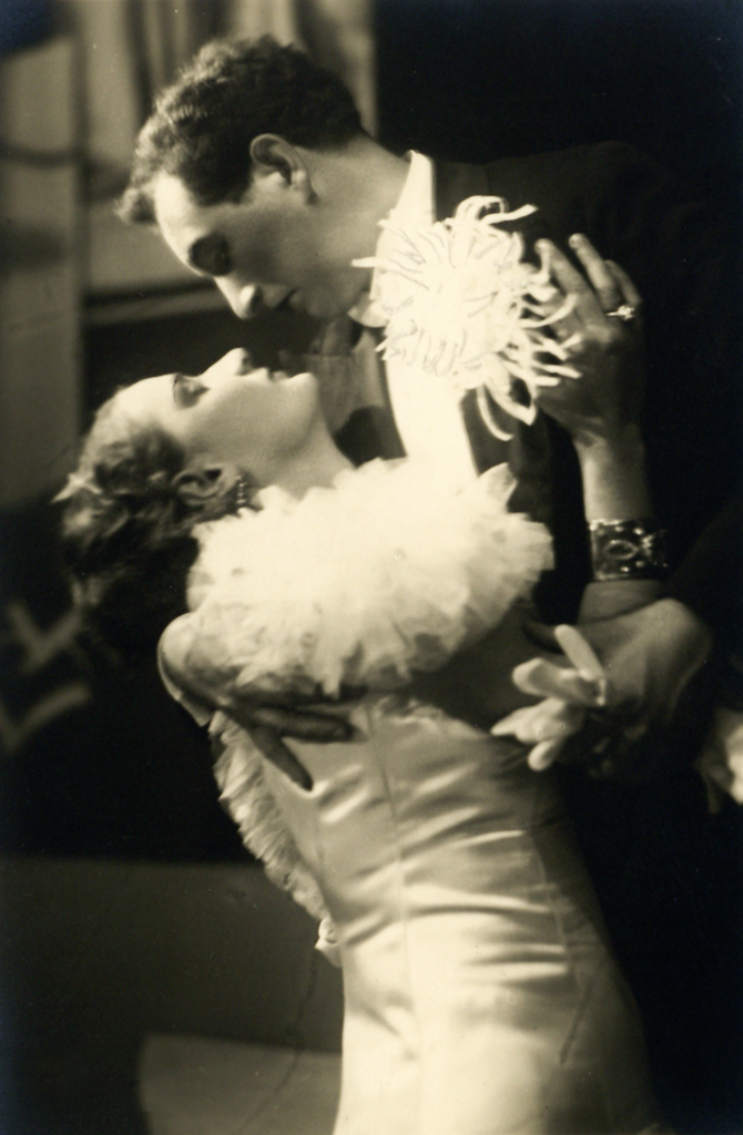 Ivan Cankar, Pohujšanje v dolini šentflorjanski, Narodno gledališče v Mariboru. Na fotografiji: Branka Rasberger-Verdonik (Jacinta), Rado Nakrst (Peter).